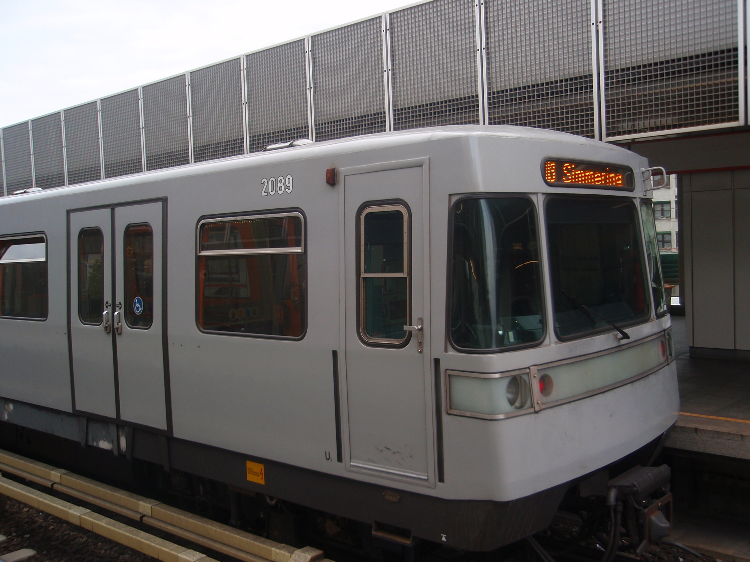 Typ U2 in der Station Ottakring